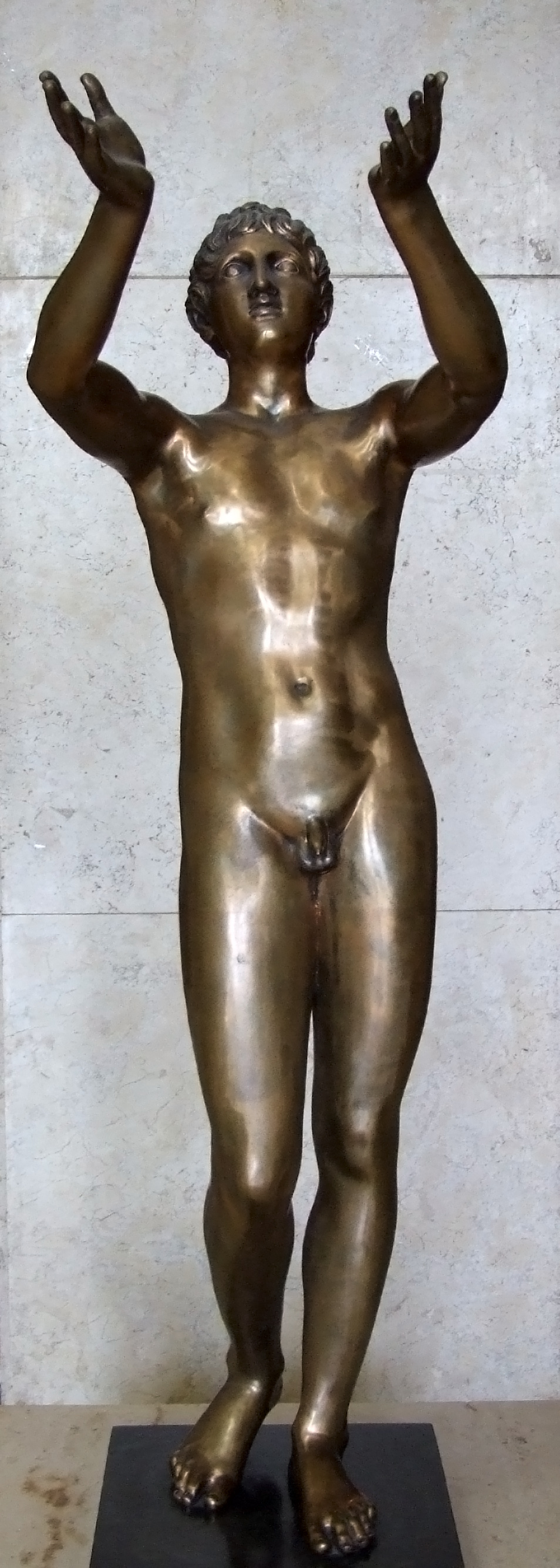 Der „betende Knabe“ im Hauptgebäude der RWTH Aachen